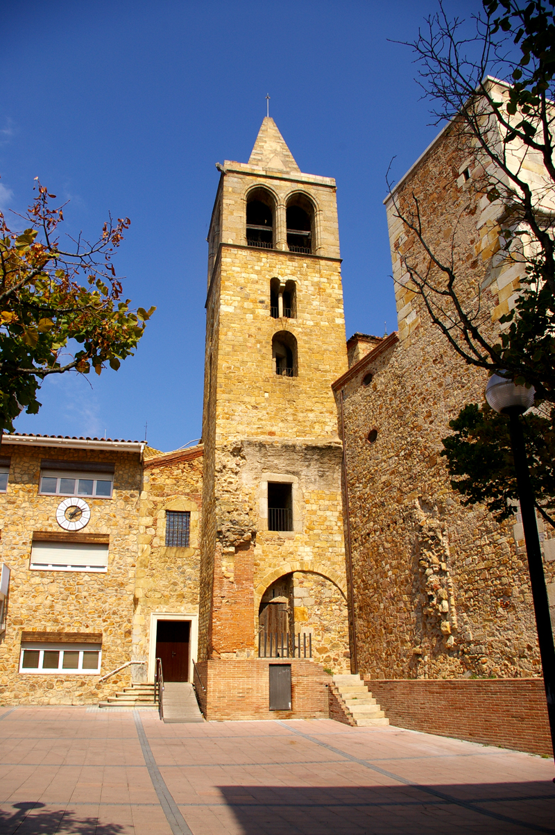 Campanar de l'Església de Sant Esteve a Tordera (El Maresme, Catalunya)